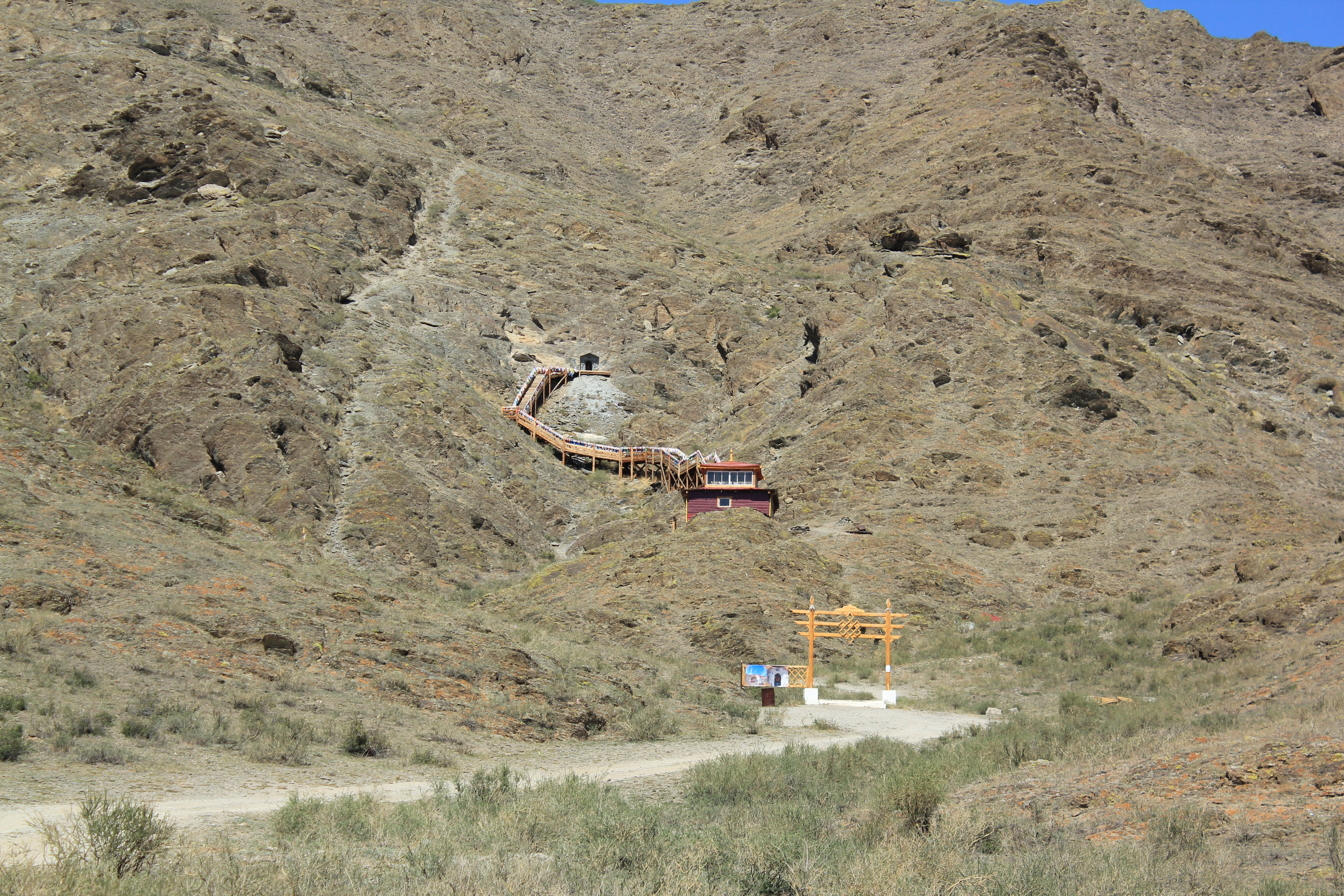 Копия "Буддийской ниши" в Чаа-Хольском районе